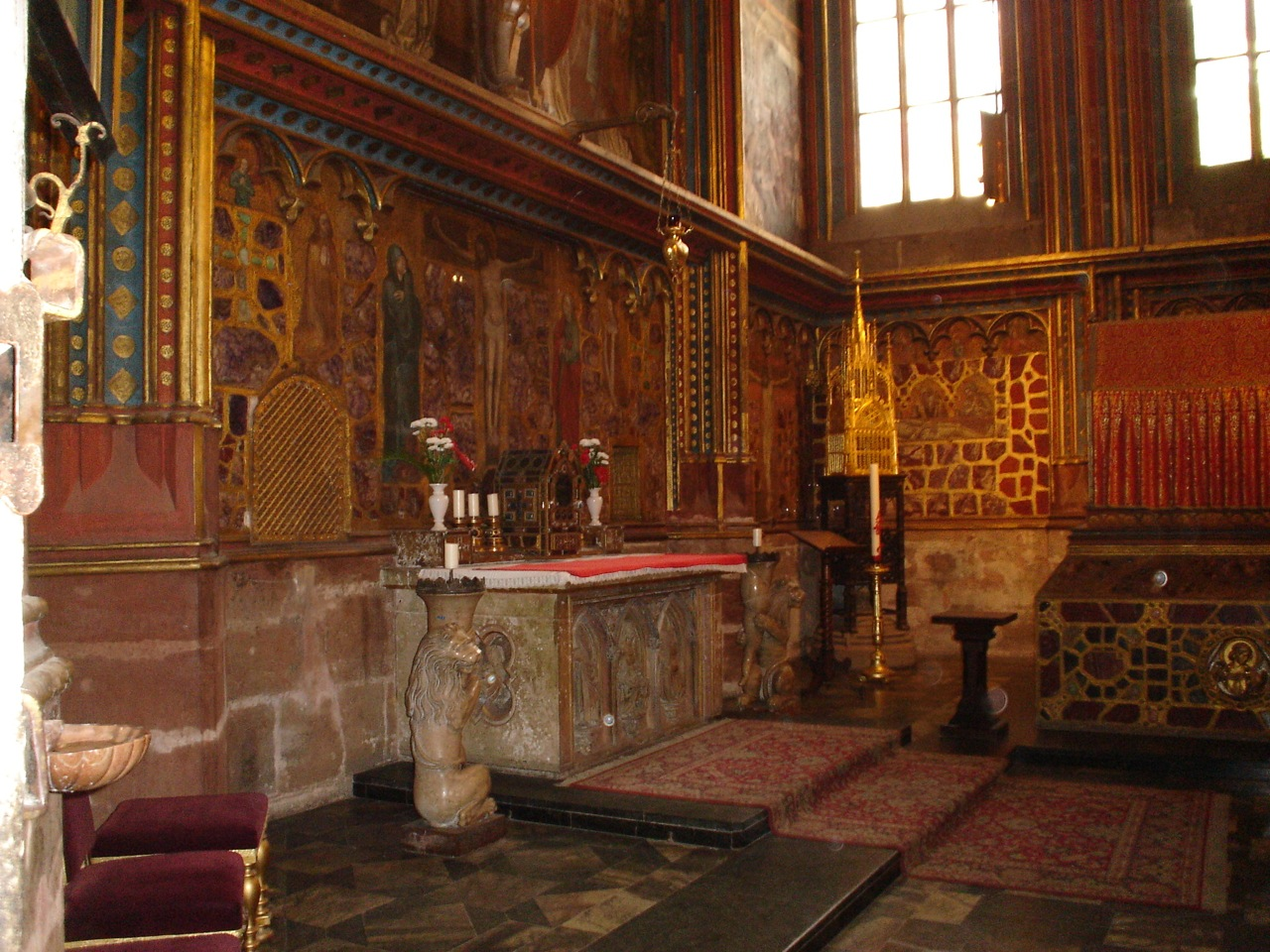 Praha, Katedrála svatého Víta, Václava a Vojtěcha, Svatováclavská kaple